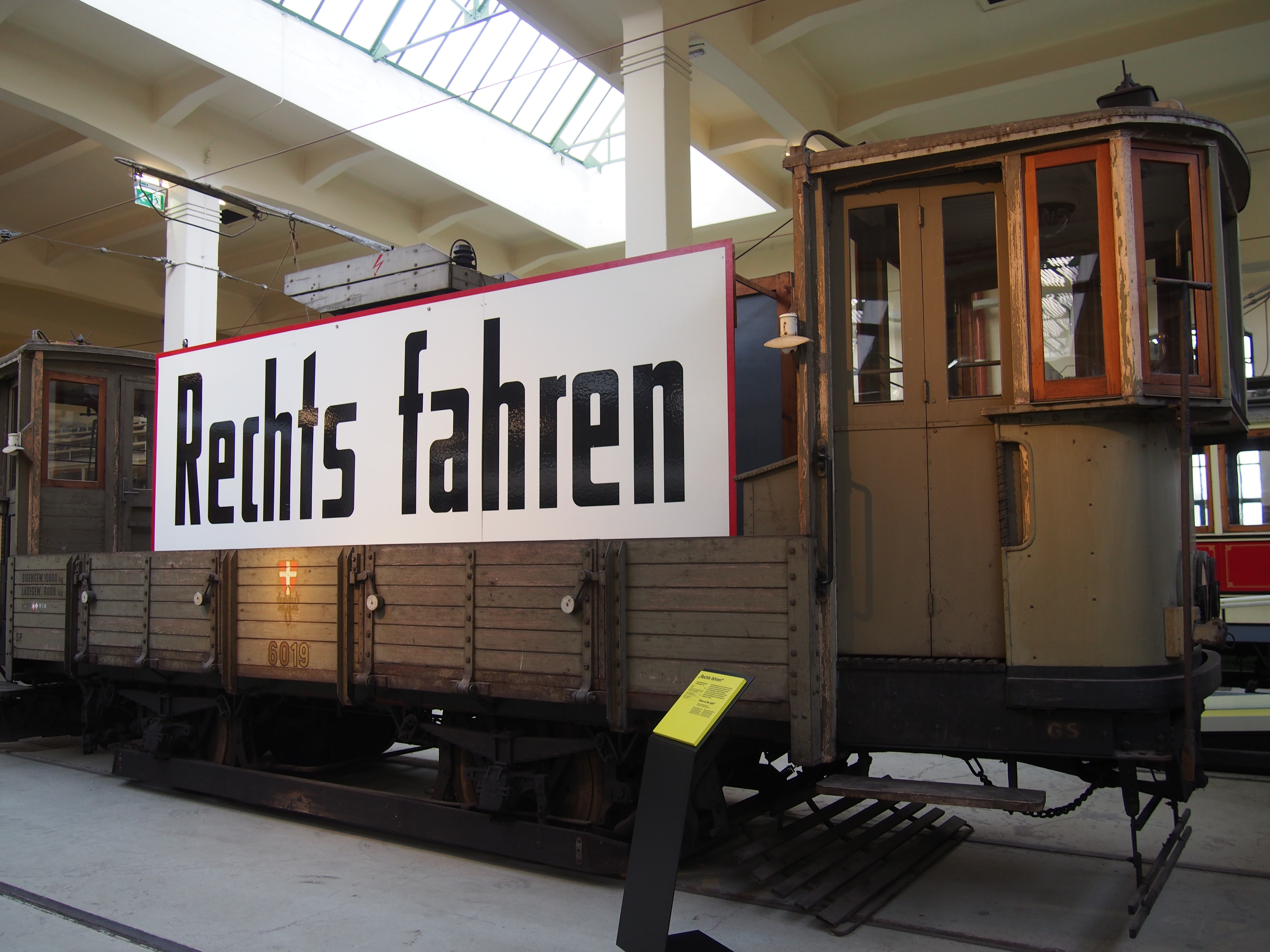 Remise - Transport Museum Vienna (Verkehrsmuseum der Wiener Linien)